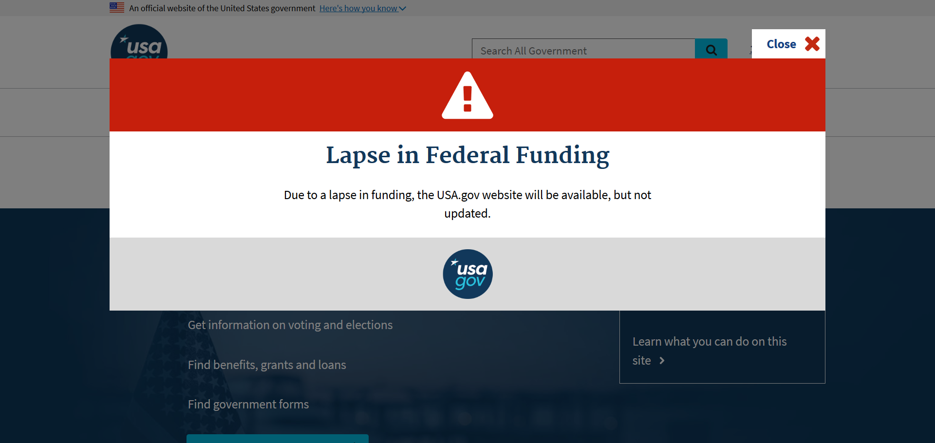 Hinweis auf der Website während des Government Shutdown